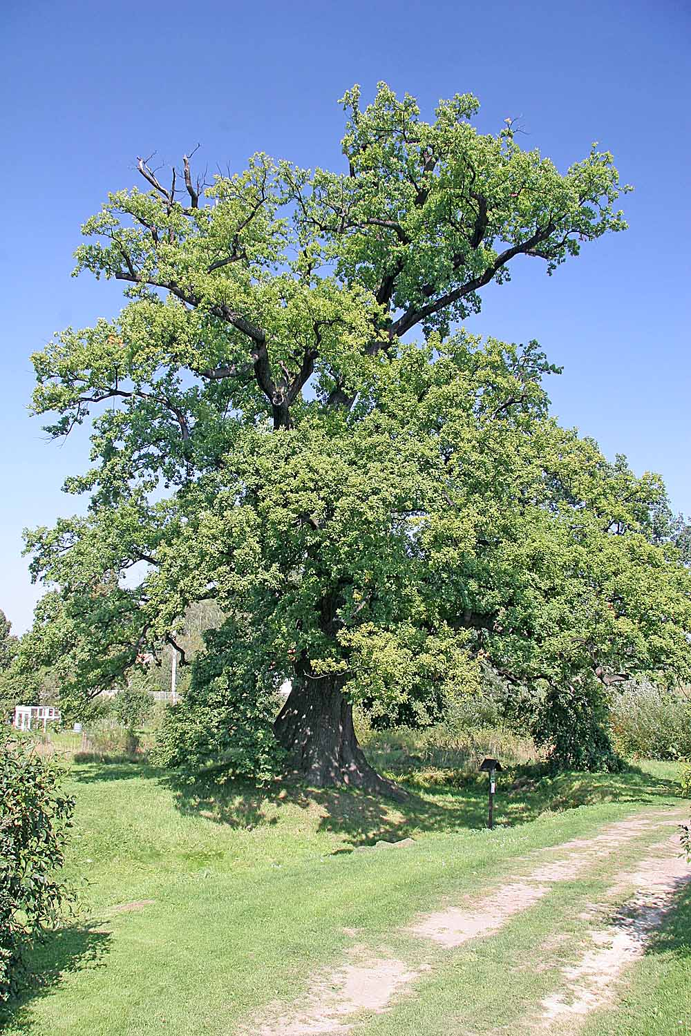 Památný dub letní v obci Lukavice v okrese Chrudim